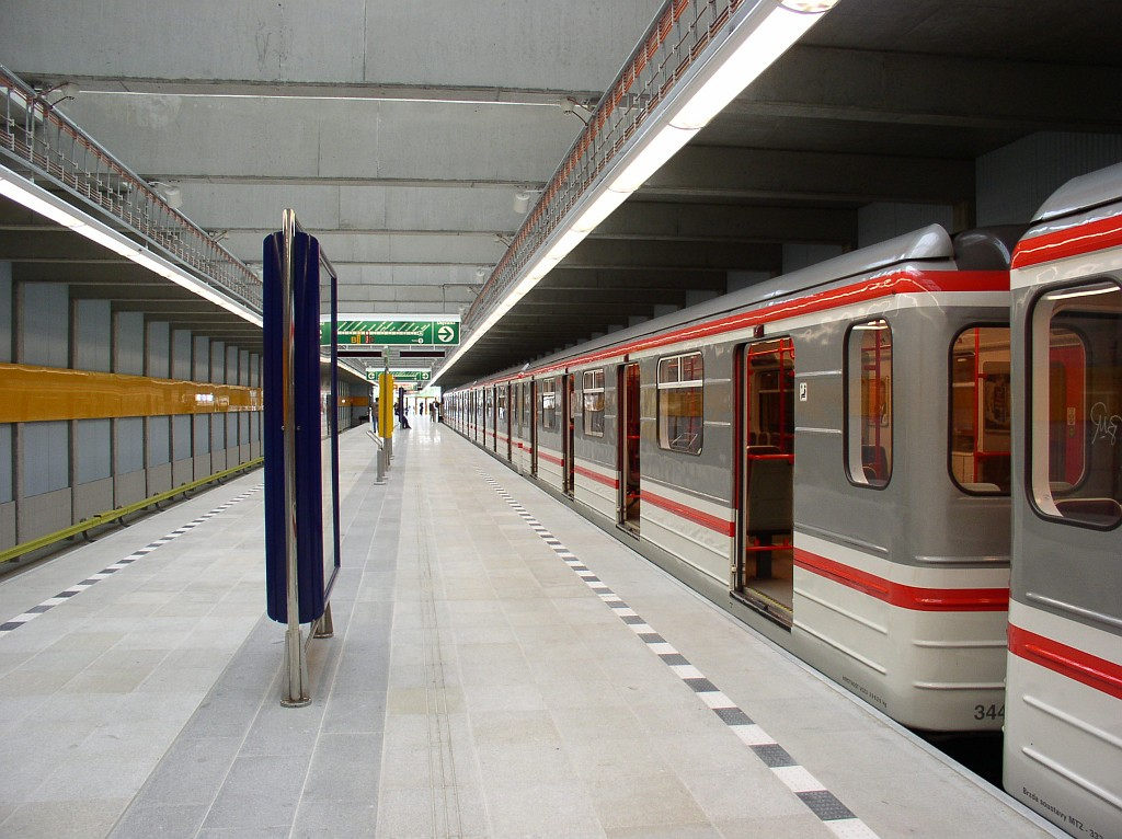 Metro station Depo Hostivař in Prague, train in station – Stanice metra Depo Hostivař, vlak ve stanici